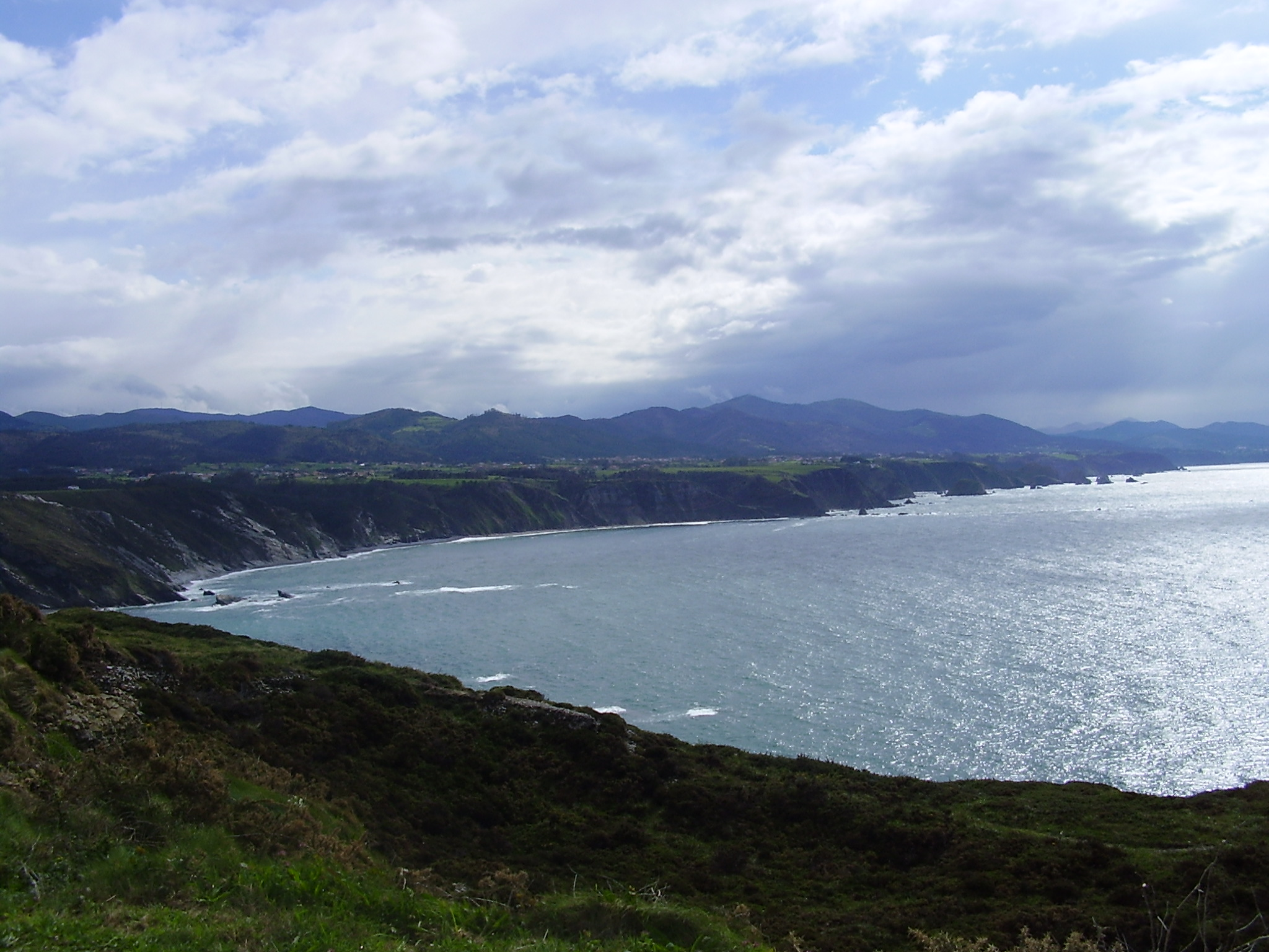 Vista desde Cabo Vidio.